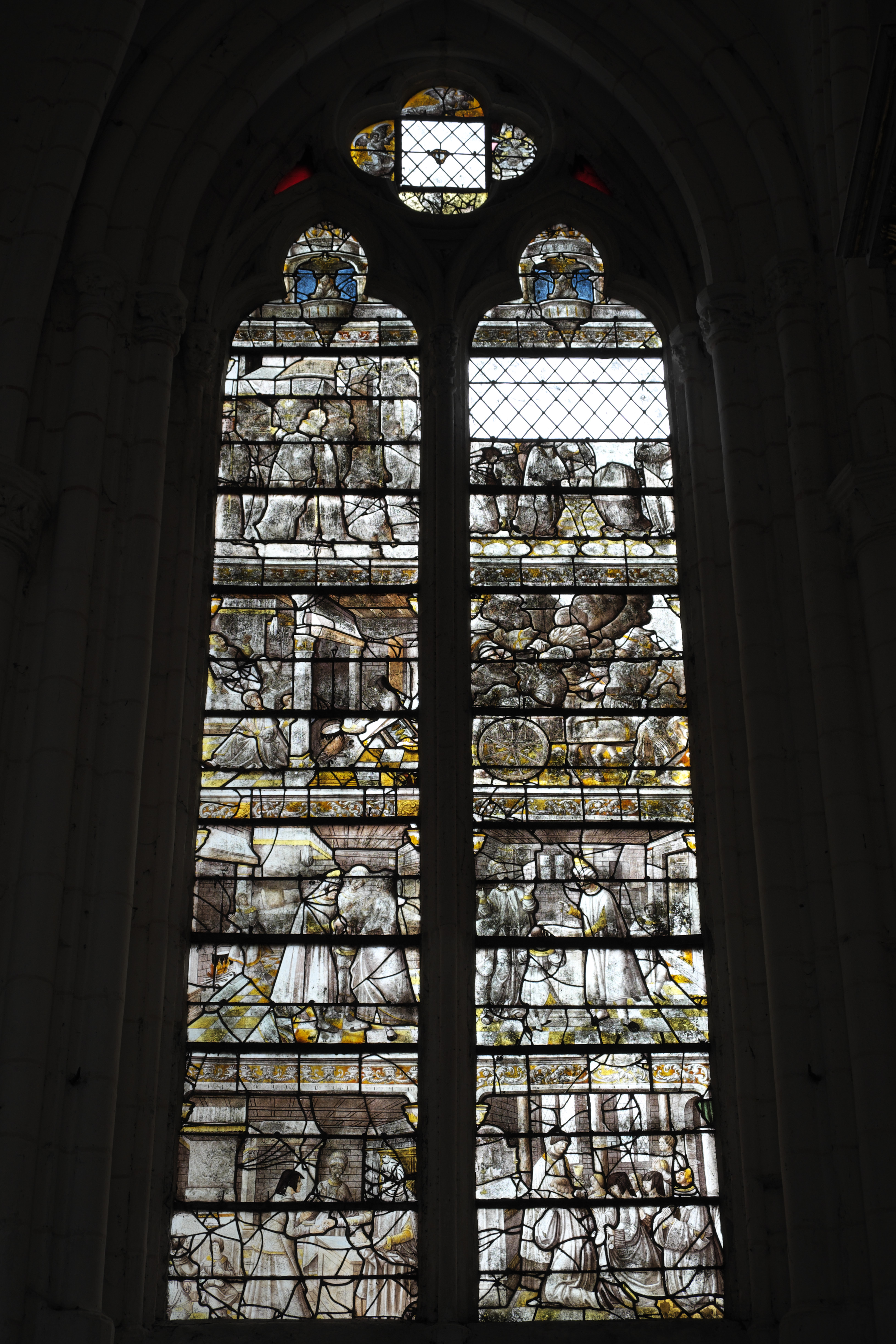 Katholische Kirche Sainte-Tanche in Lhuître im Département Aube (Champagne-Ardenne/Frankreich), Bleiglasfenster in Grisaille aus dem zweiten Viertel des 16. Jahrhunderts, Darstellung: Hostienfrevel (Miracle des Billettes) .